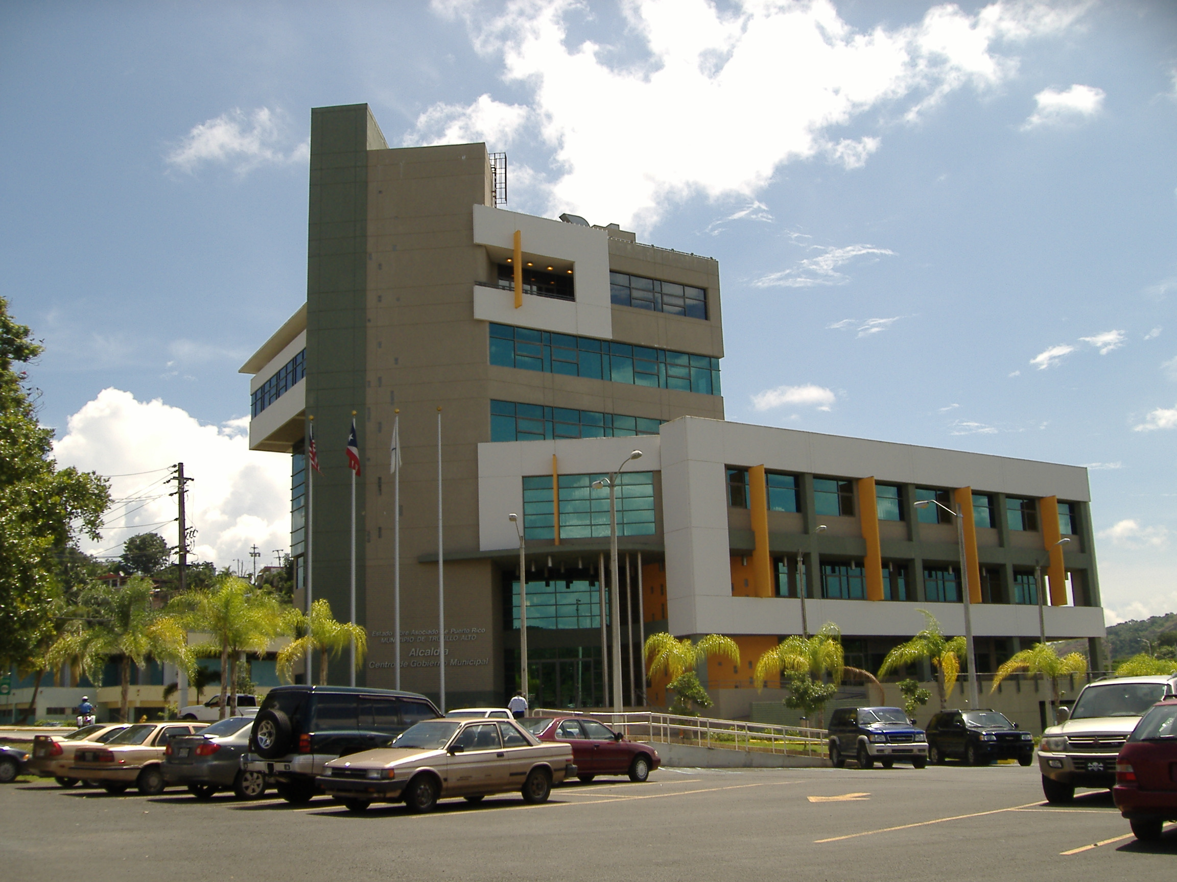 Trujillo Alto, Puerto Rico City Hall.